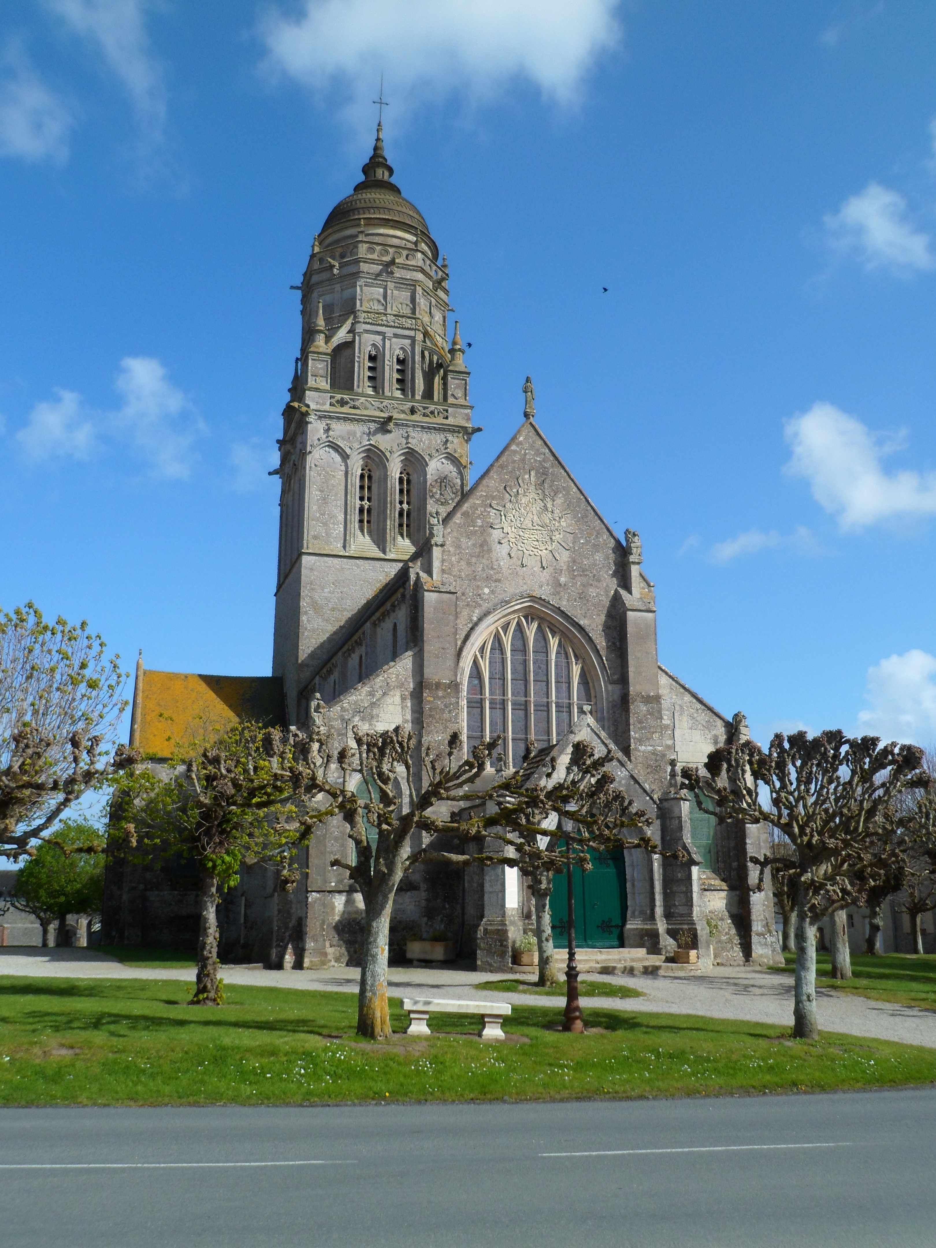 Église de Sainte-Marie-du-Mont .